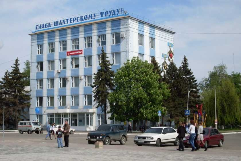 ПАО "Краснодонуголь"